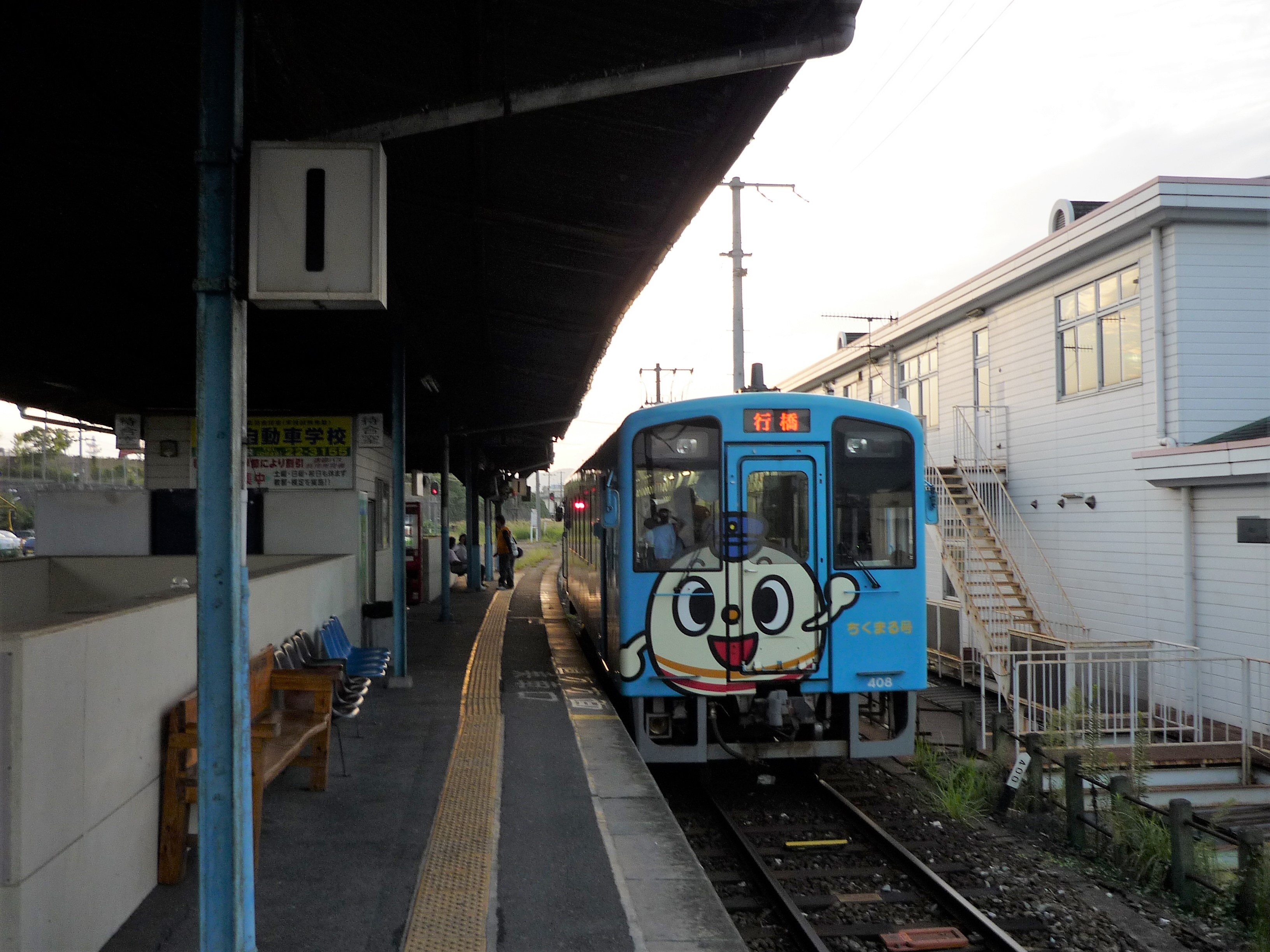 田川伊田駅に停車中の平成筑豊鉄道400形408（2009年） Panasonic Lumix DMC-FS3